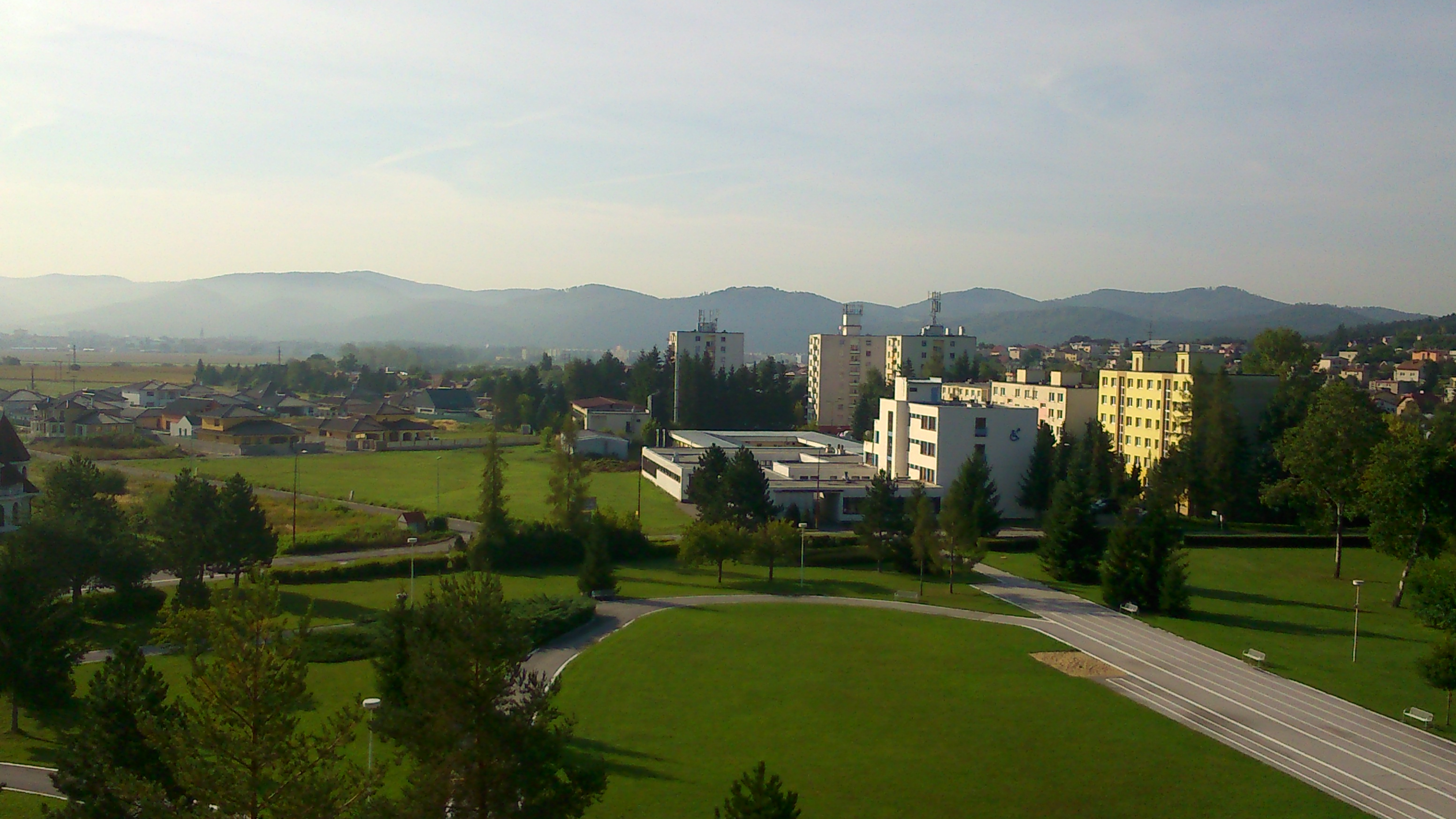 Časť obce